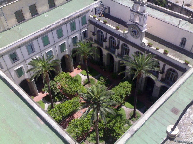 Napoli, Complesso della basilica santuario di Santa Maria del Carmine Maggiore: il chiostro visto dall'alto.